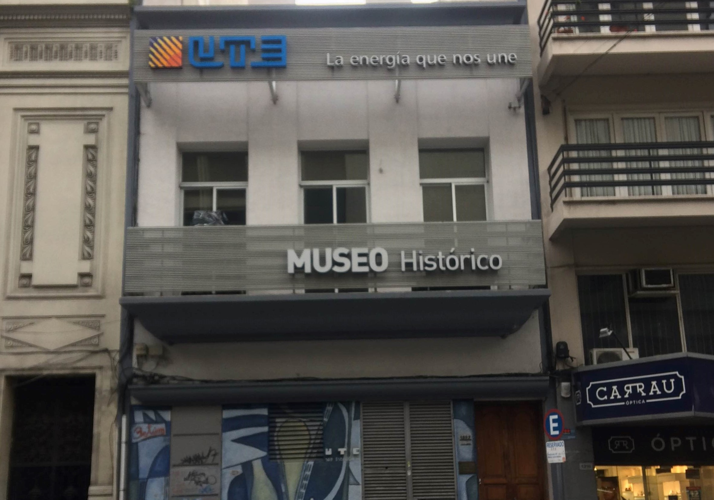 Museo de UTE